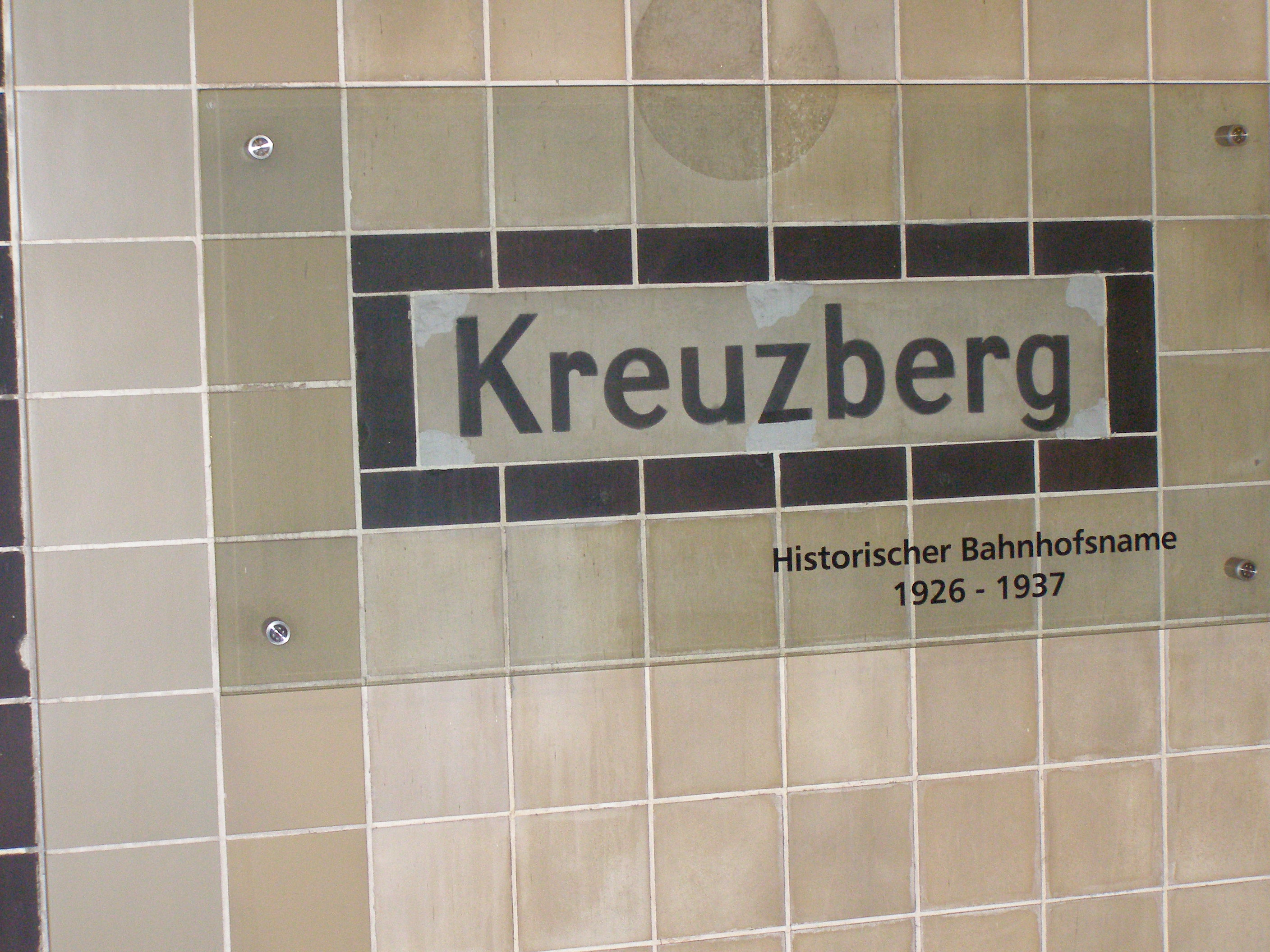 U-Bahnhof Platz der Luftbrücke, Berlin (historischer Name, auf dem Bahnsteig) underground station Platz der Luftbrücke, Berlin (historical name of the station, on the platform)